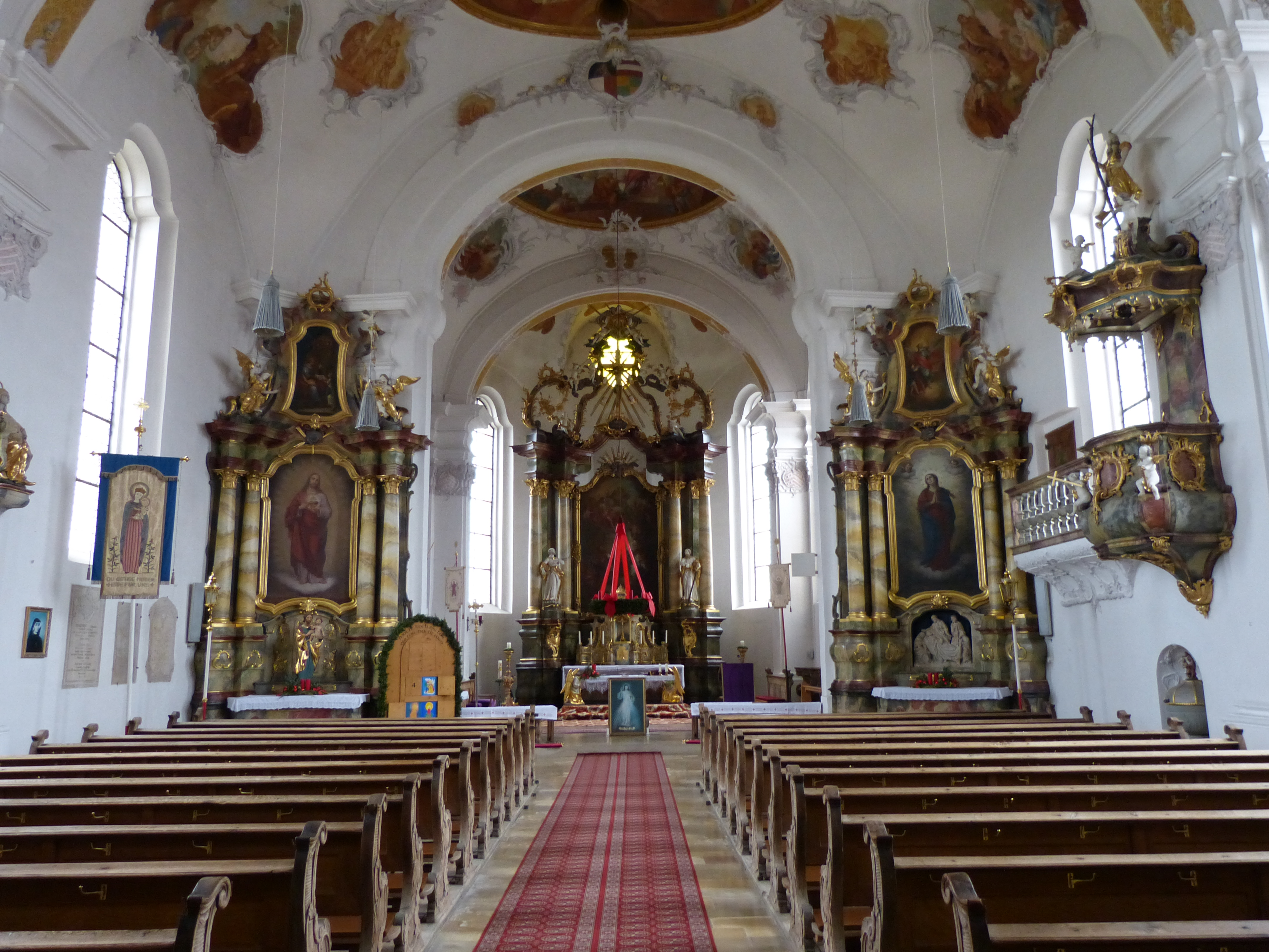 St. Gordian und Epimachus, Pleß, Landkreis Unterallgäu, Bayern